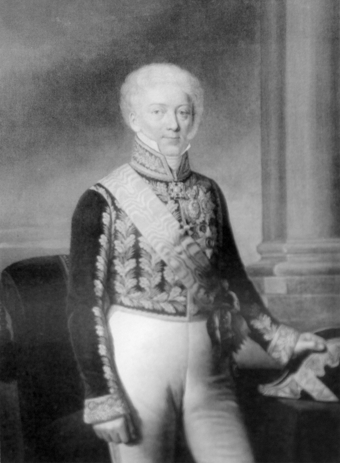 Николай Николаевич Новосильцев - (Новосильцов; 1761 — 8 (20 апреля) 1838, Санкт-Петербург) — русский государственный деятель, граф.